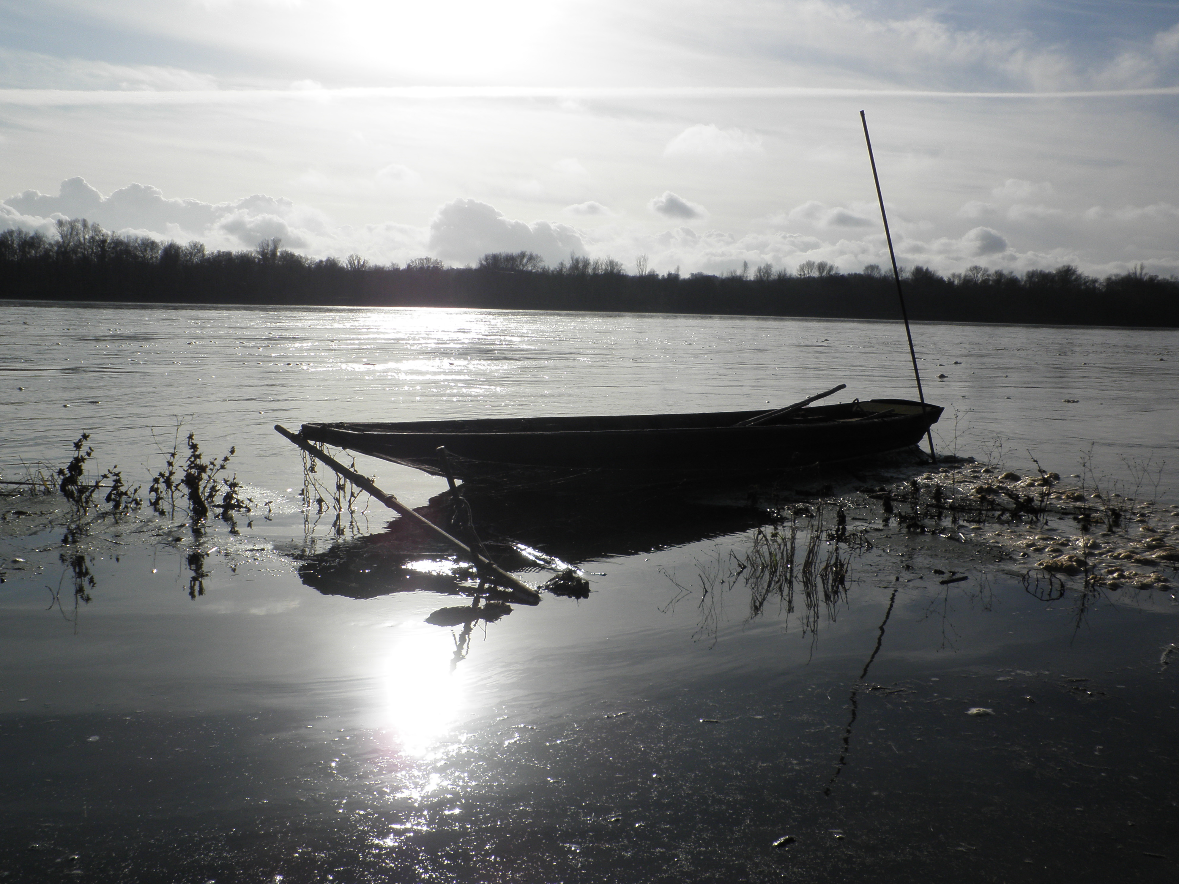 Une gabare sur la loire à saint-Mathurin-sur-Loire (49) en Décembre 2009